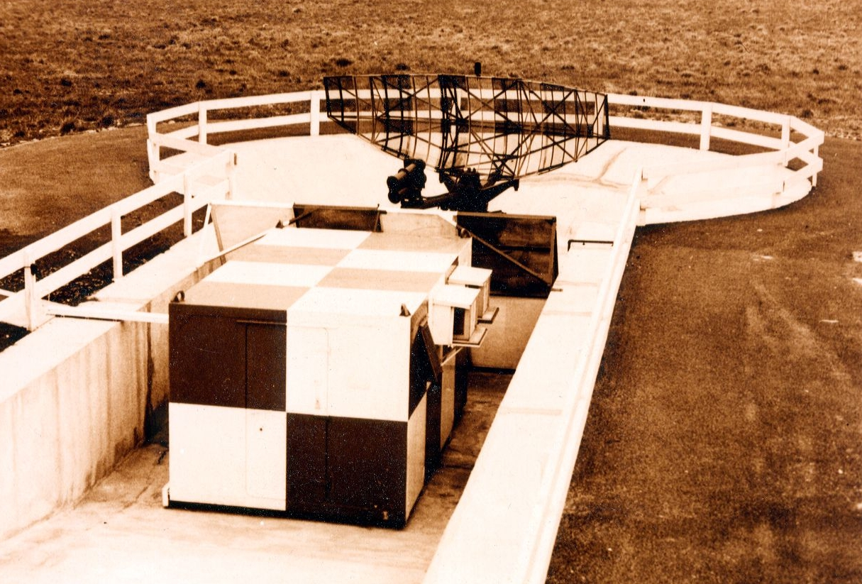 photo archives perso